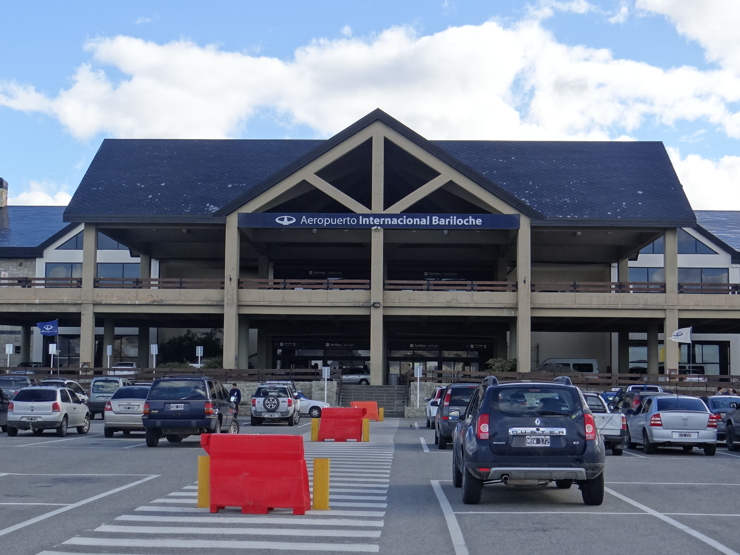 Frente del Aeropuerto Internacional Teniente Luis Candelaria (Bariloche)